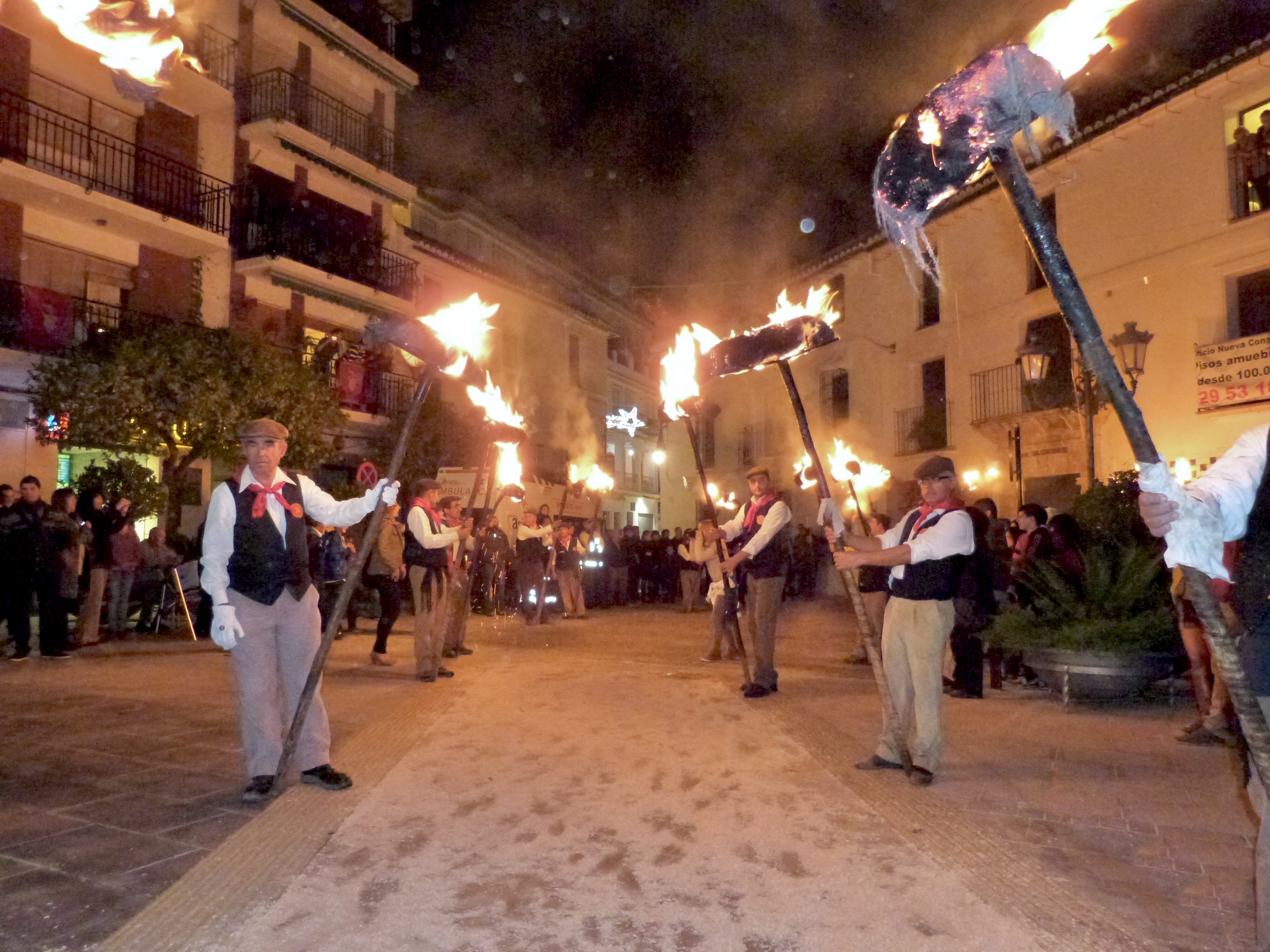 De Carmen Pérez